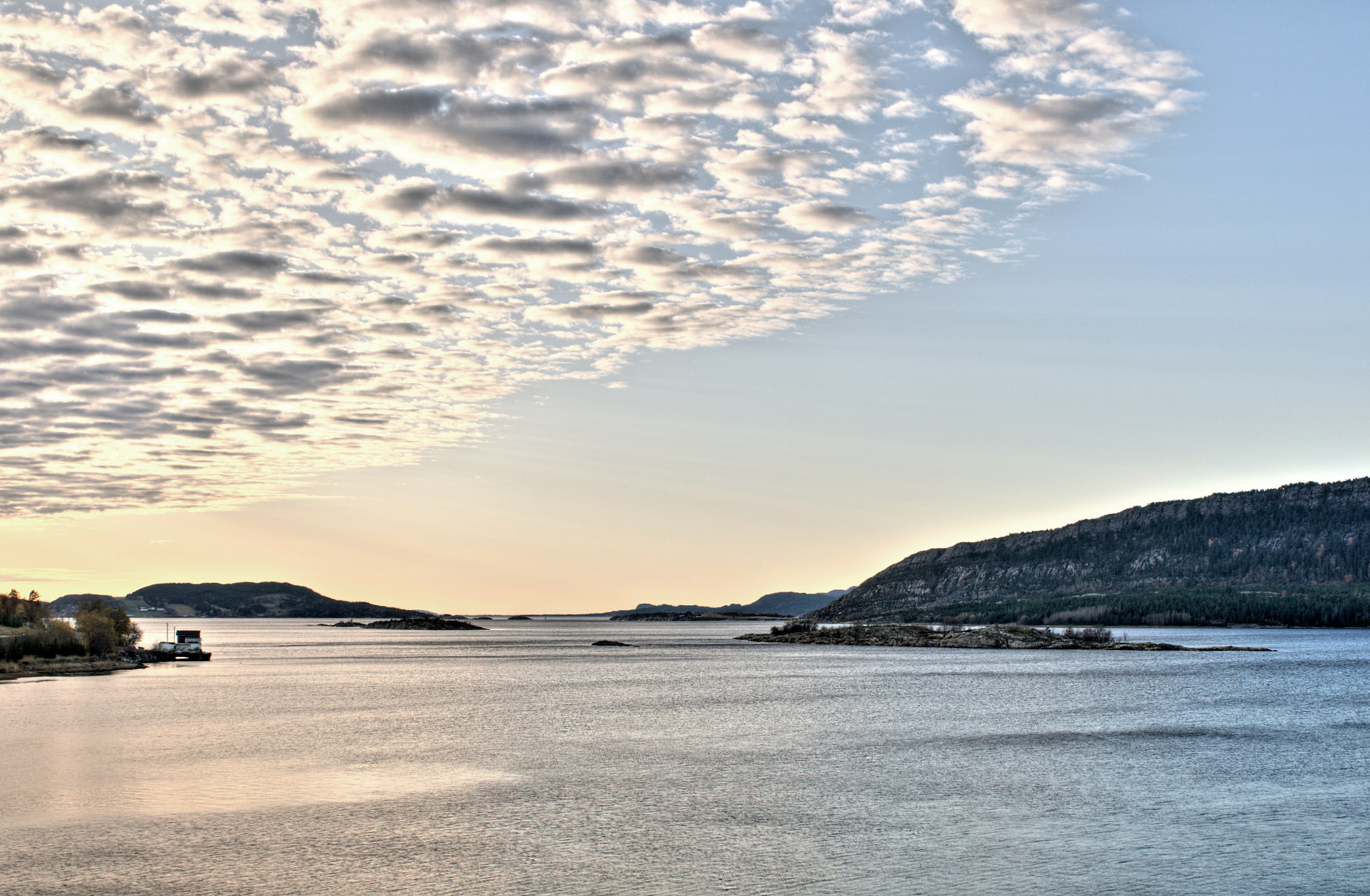 Sørfjorden, en arm av Stjørnfjorden